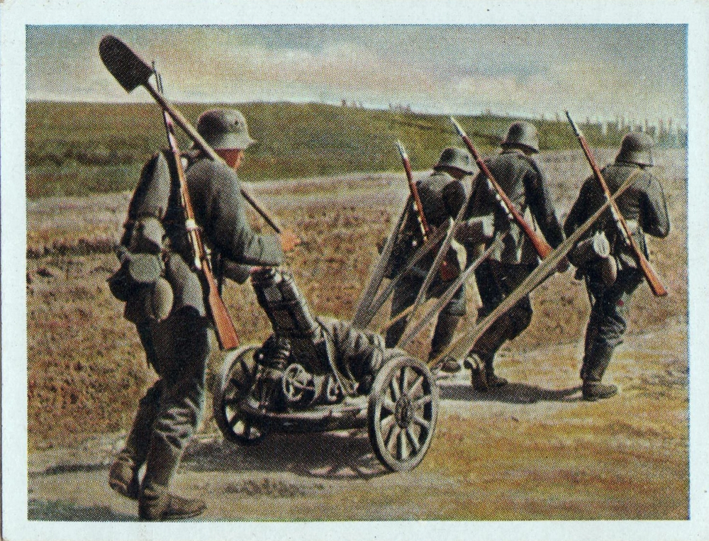 Leichter Minenwerfer 7,58 cm, auf Lafette, Stellungswechsel